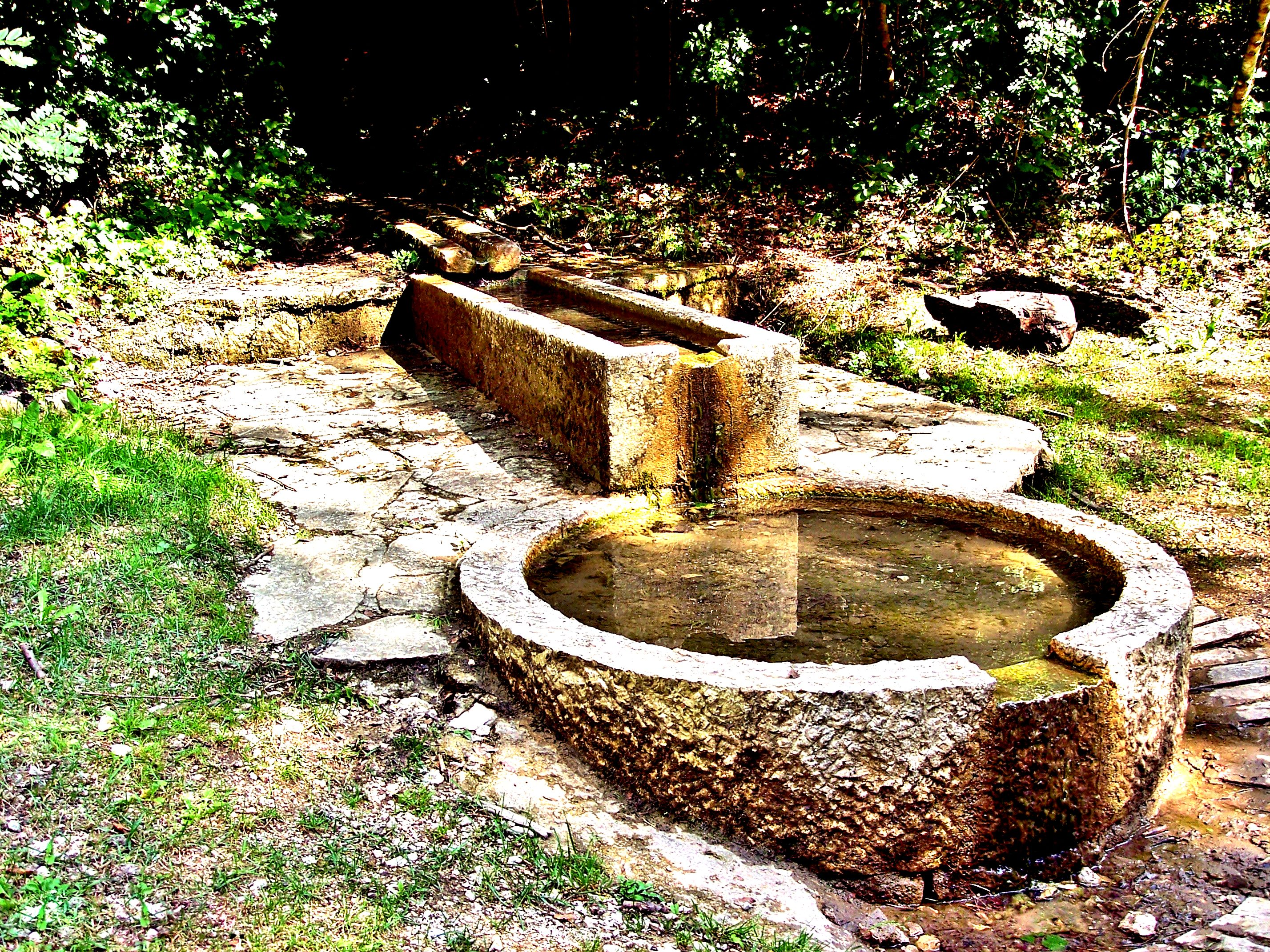 Fontaine ronde. Dans le vallon sec de la Creuse, sous le village de Blamont. Doubs